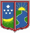 Jaguaruana